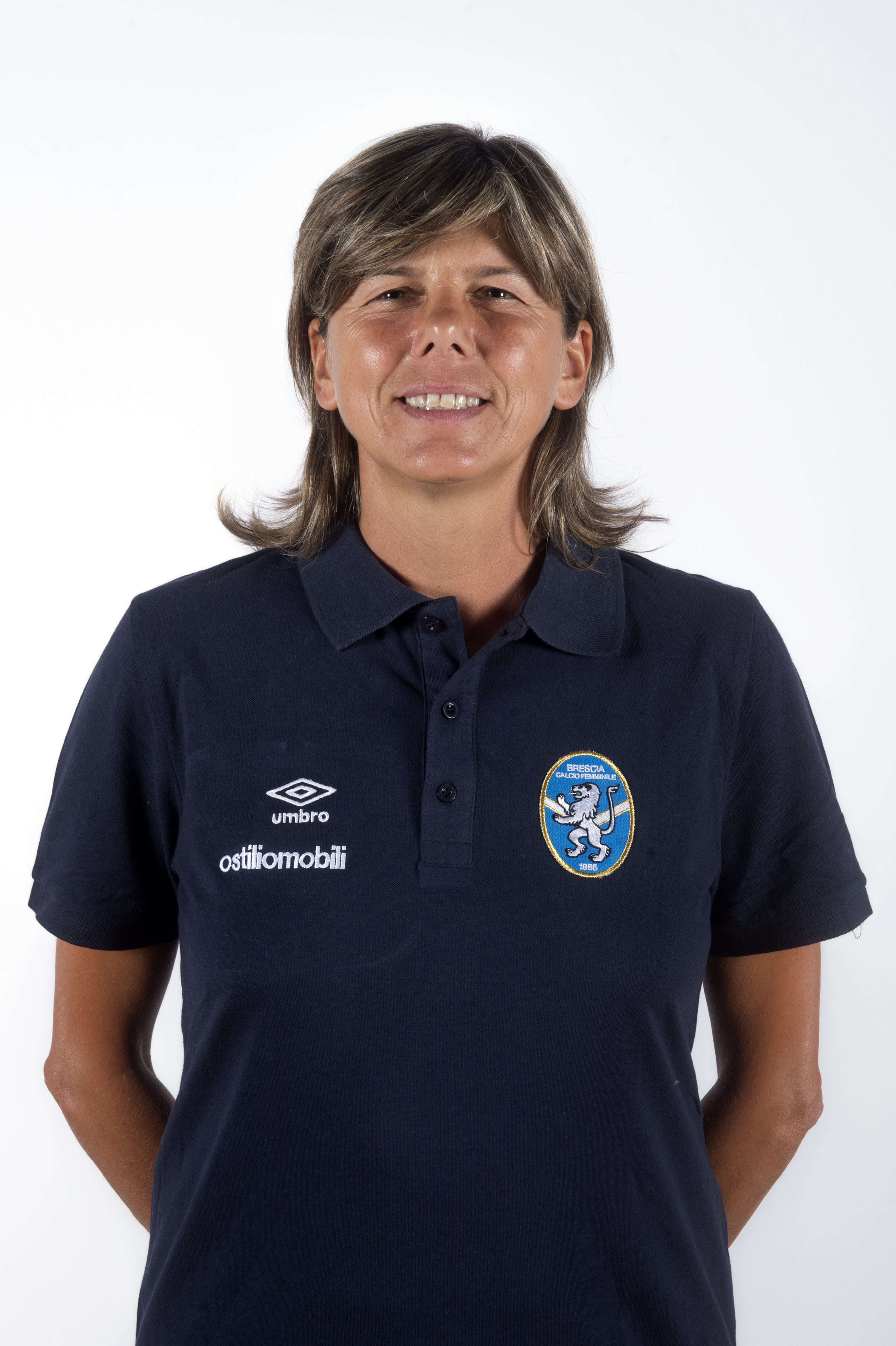 Milena Bertolini, ex difensore, allenatore Brescia Calcio Femminile, foto ufficiale stagione 2016-2017.